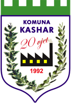 Komuna Kashar